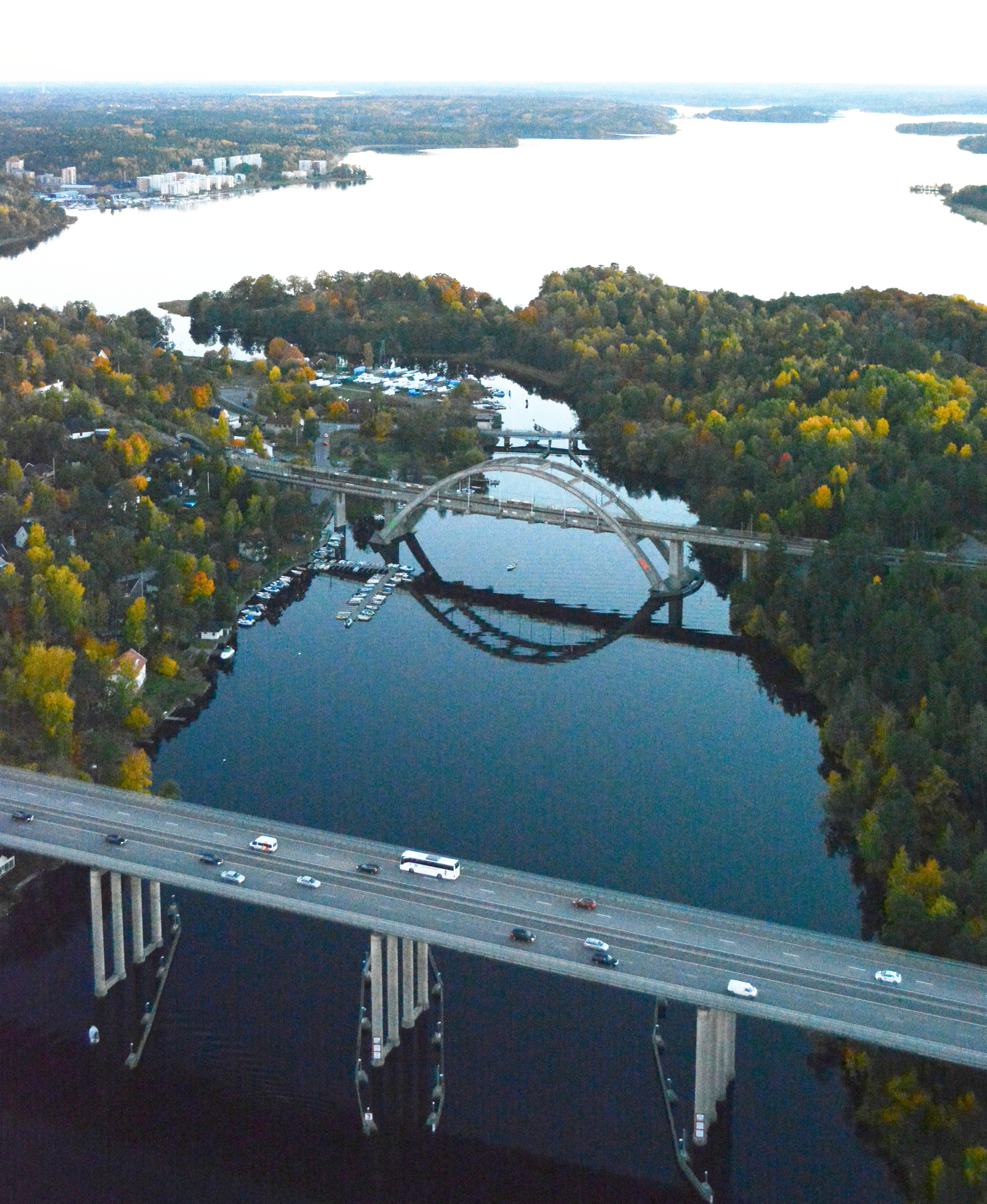 Stäksundet sett mot syd med Mälaren i bakgrunden